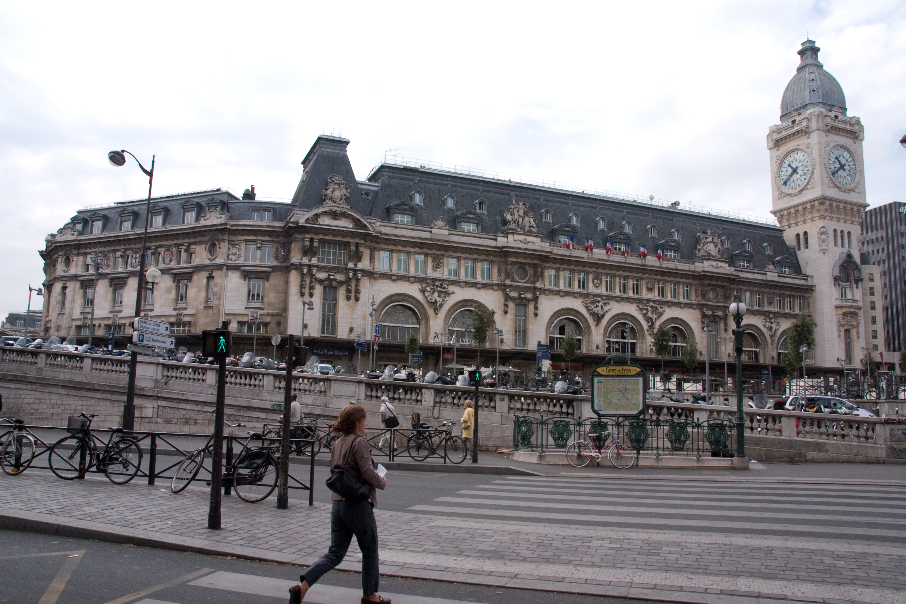 Gare de Lyon, Paris, France